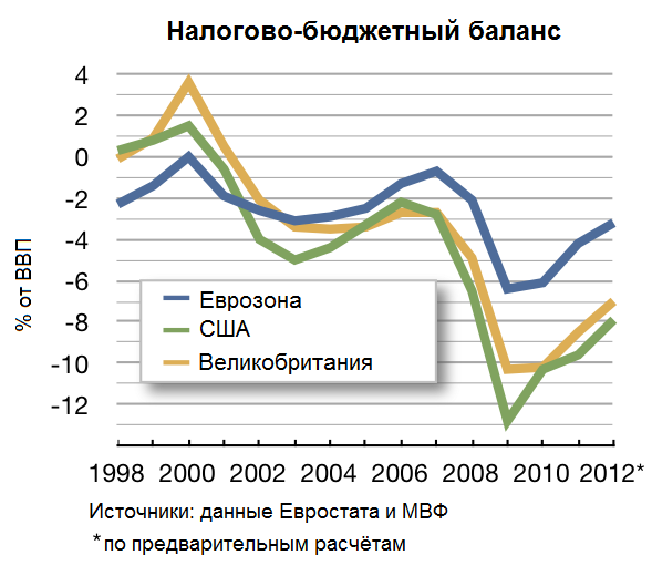 Сравнение данных по государственным бюджетам стран еврозоны, США и Великобритании (!), 2001-2012 гг. Данные за 1998-2000 гг. взяты с сайта (см. Данные за 2001-2007 гг. доступны на сайте Евростата (см. Данные за 2008-2012 гг. доступны в отчёте МВФ по налогово-бюджетной политике государств (см. выпуск Fiscal Monitor за сентябрь 2011 г.)